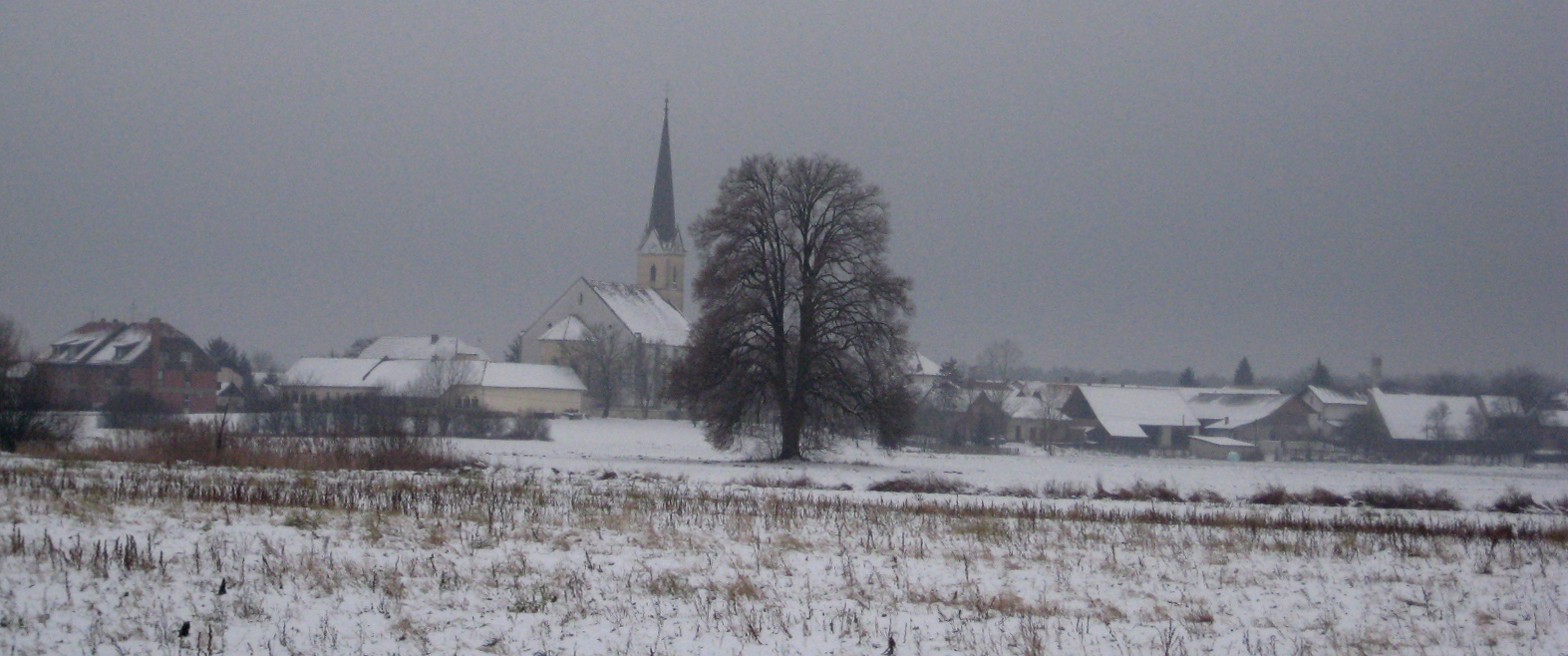 Križevci, village near Ljutomer, Slovenia